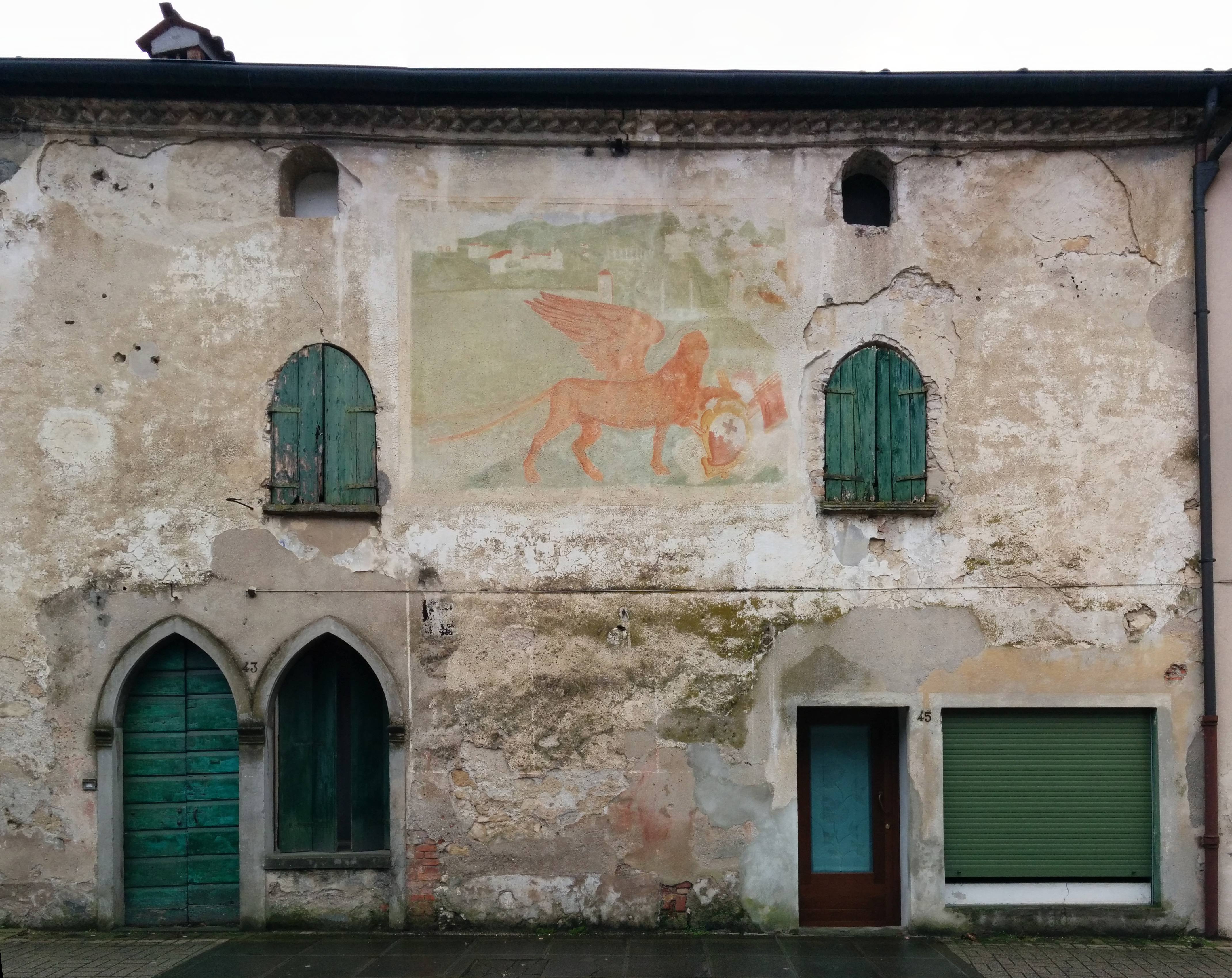 Casa Repeta a Costabissara